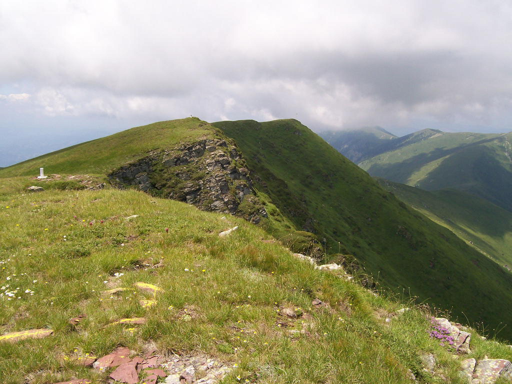 Bulgaria eta Serbia arteko mendia. Ikusten den mugarri zuriak markatzen du muga